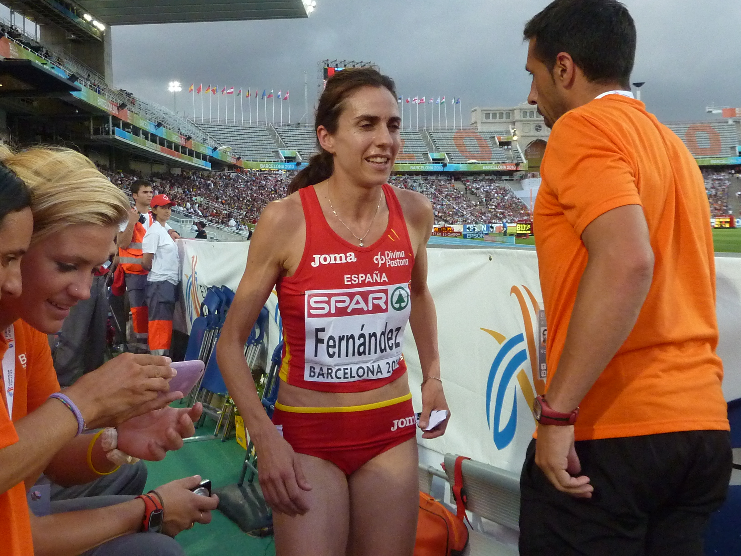 Núria Fernández